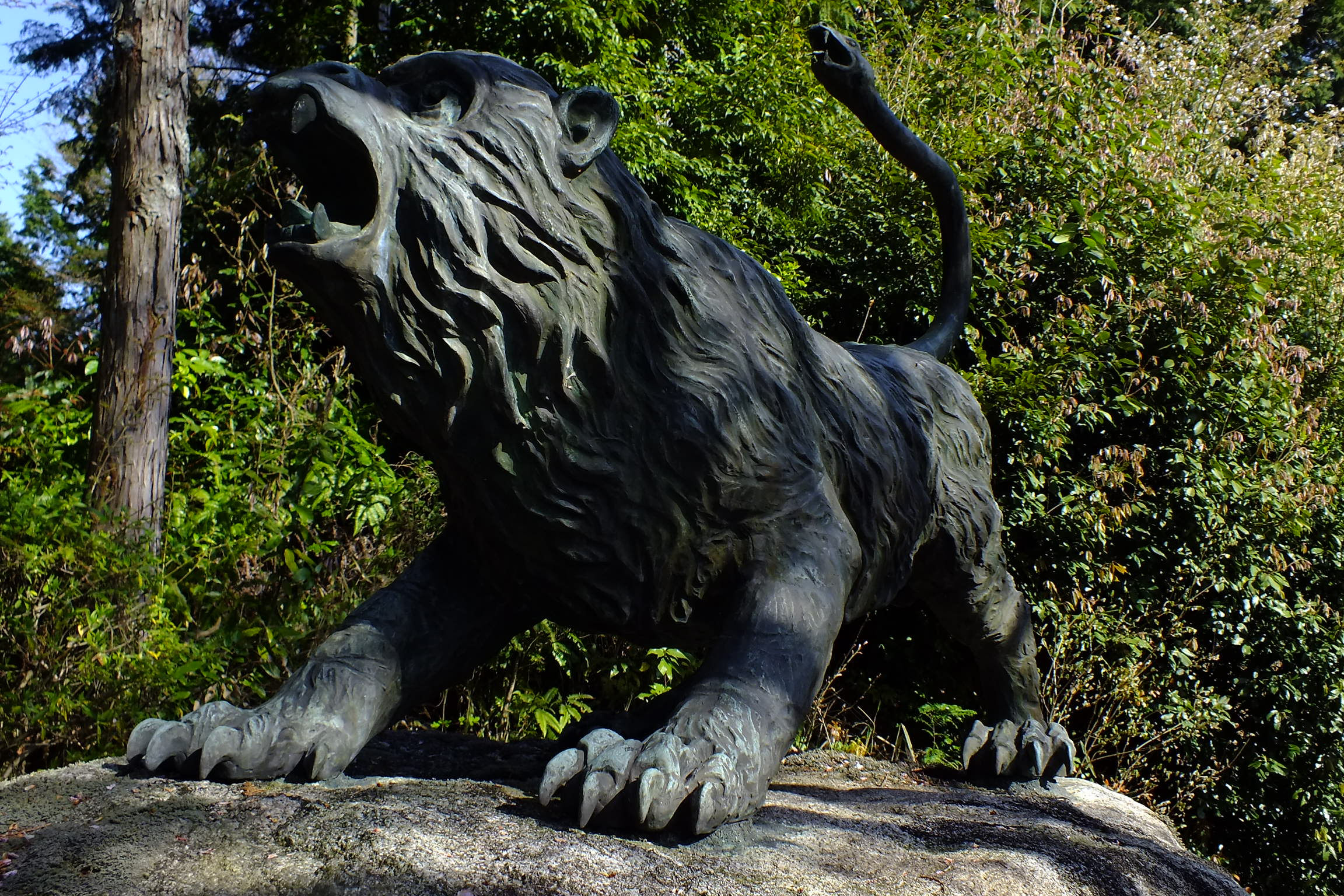 鵺、鵼、恠鳥、奴延鳥（ぬえ） 源頼政の怪物（鵺）退治